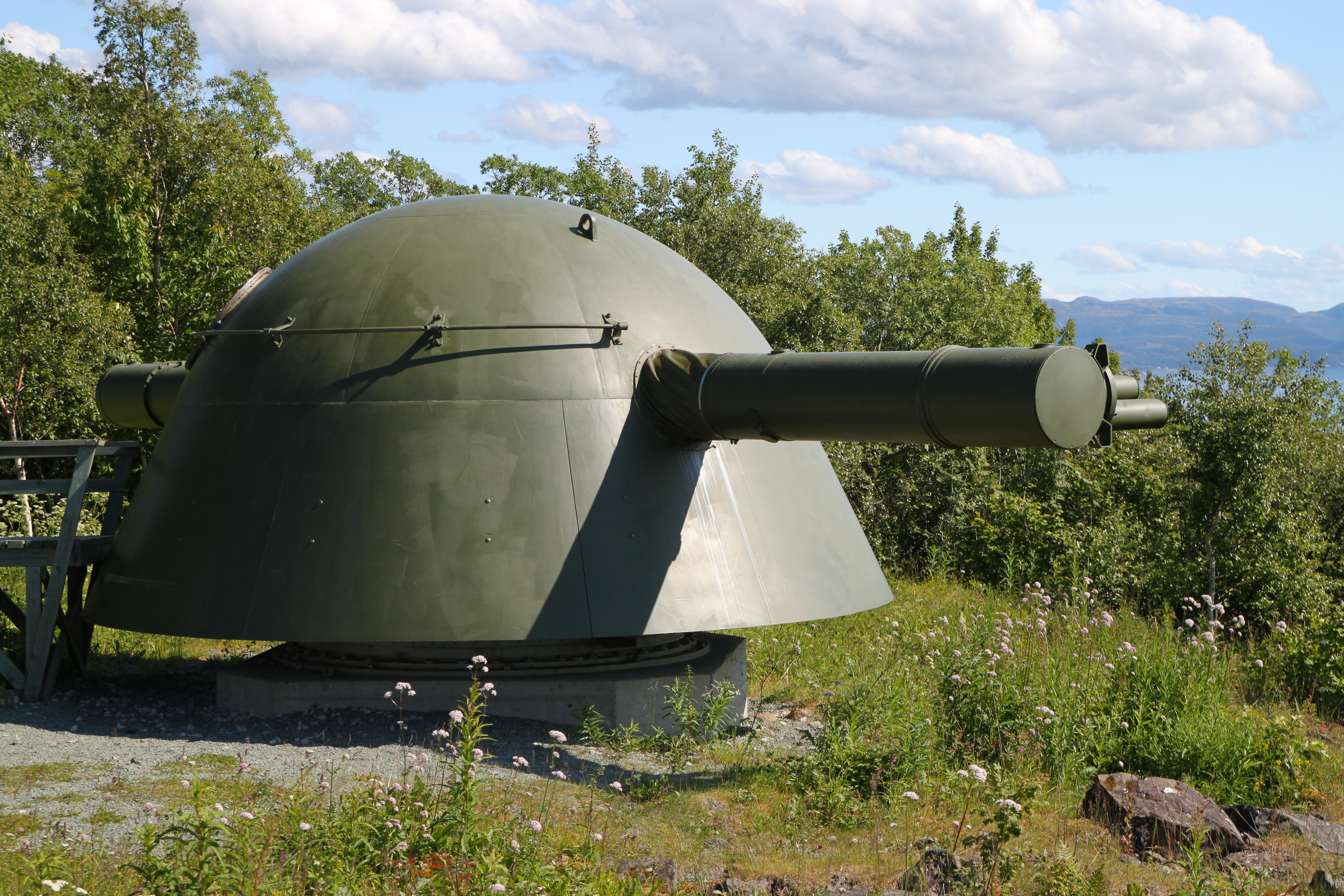 Dieser Entfernungsmesser wurde erst später in Turmnähe verfrachtet. Er befand sich vorher nahe der Feuerleitstelle auf Lorbern, ca. 2,5 km Luftlinie. 28 cm SK C/34 gun at Austrått Fort in Ørland, Norway